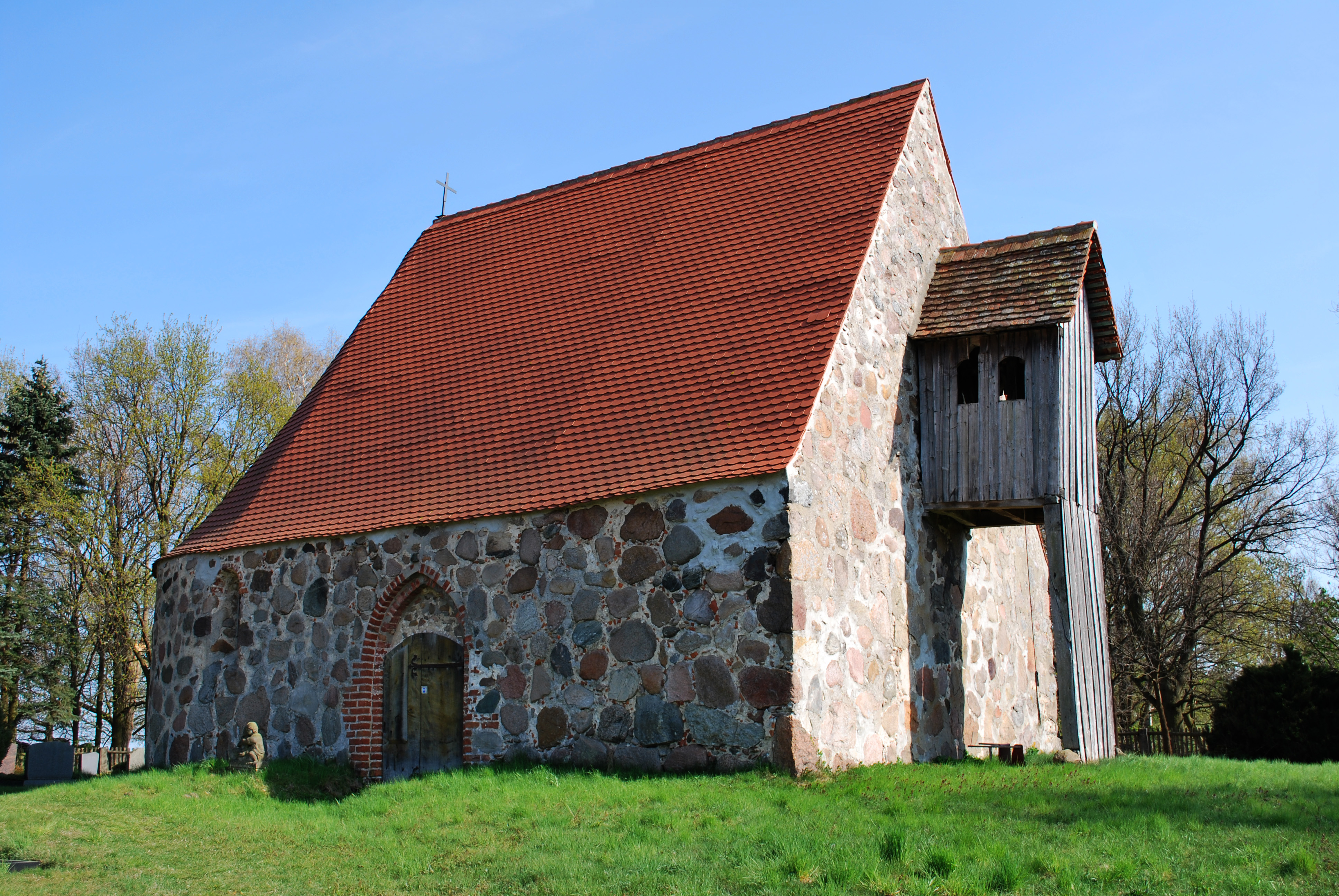 Dorfkirche in Klein Apenburg (Flecken Apenburg-Winderfeld)